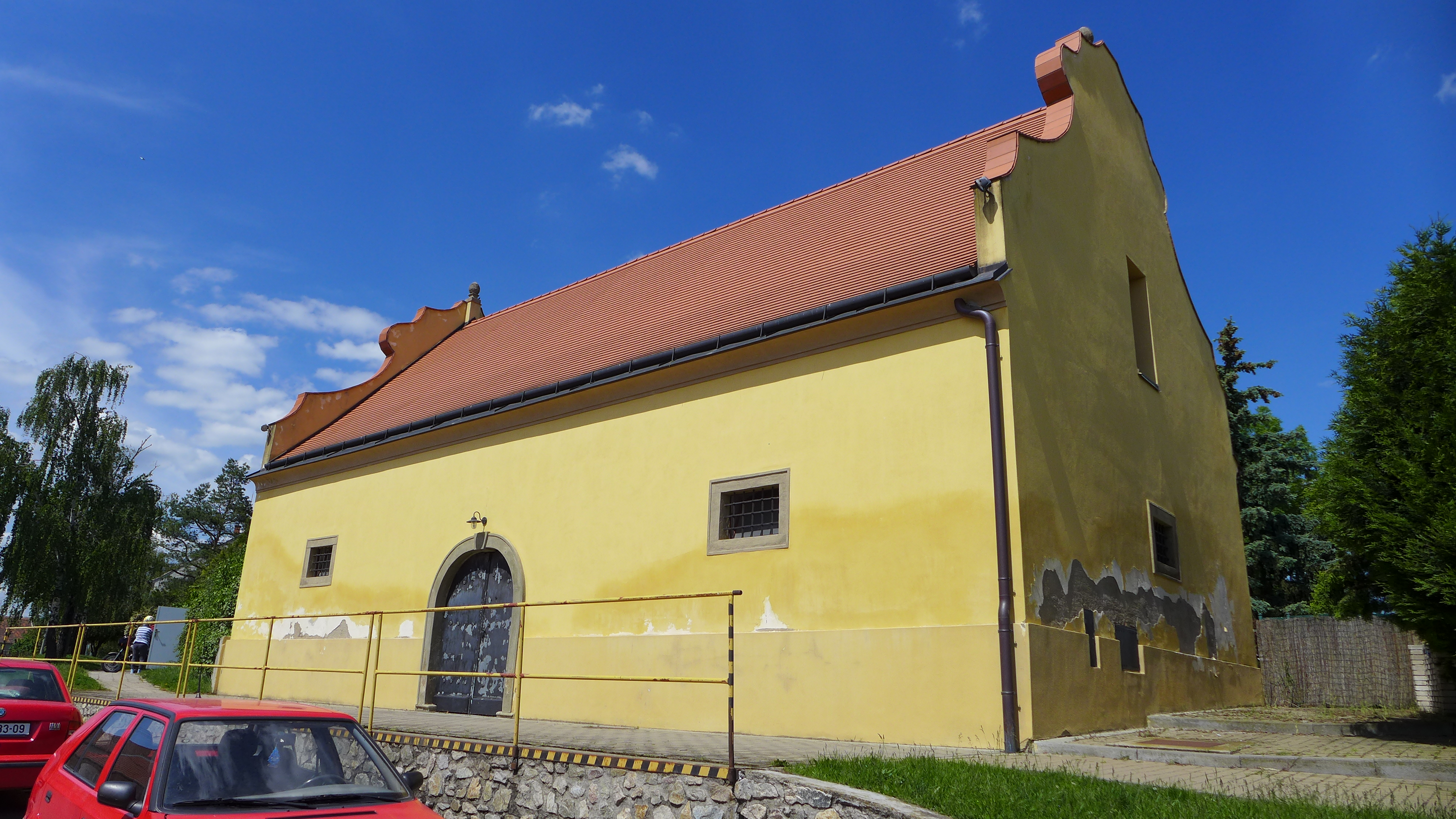 Vinný sklep, Nádražní, Miroslav, Miroslav (okres Znojmo).